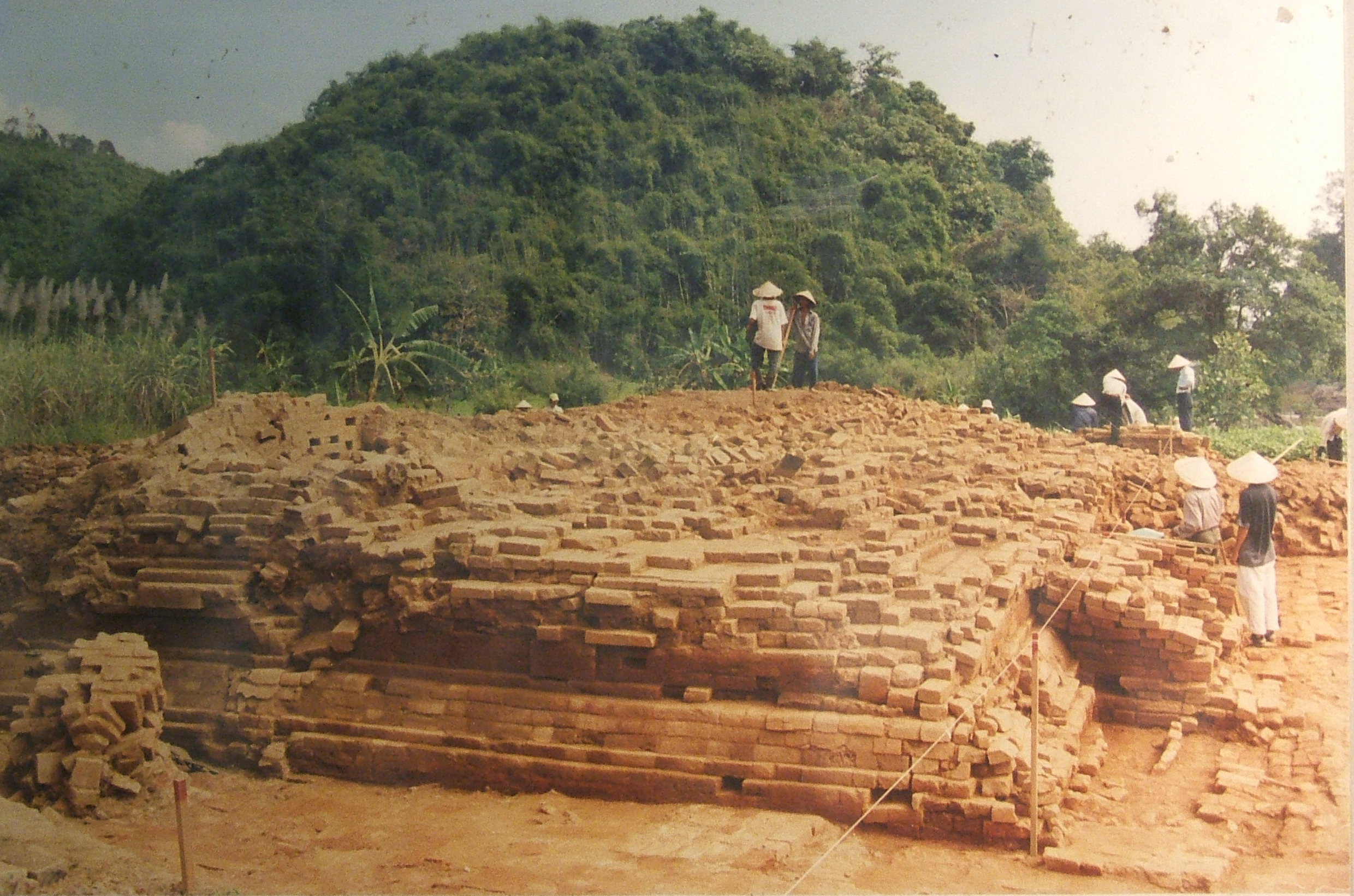 Khương Việt Hà chụp tại Viện Bảo tàng Lịch sử Việt Nam ngày 21 tháng 10 năm 2007